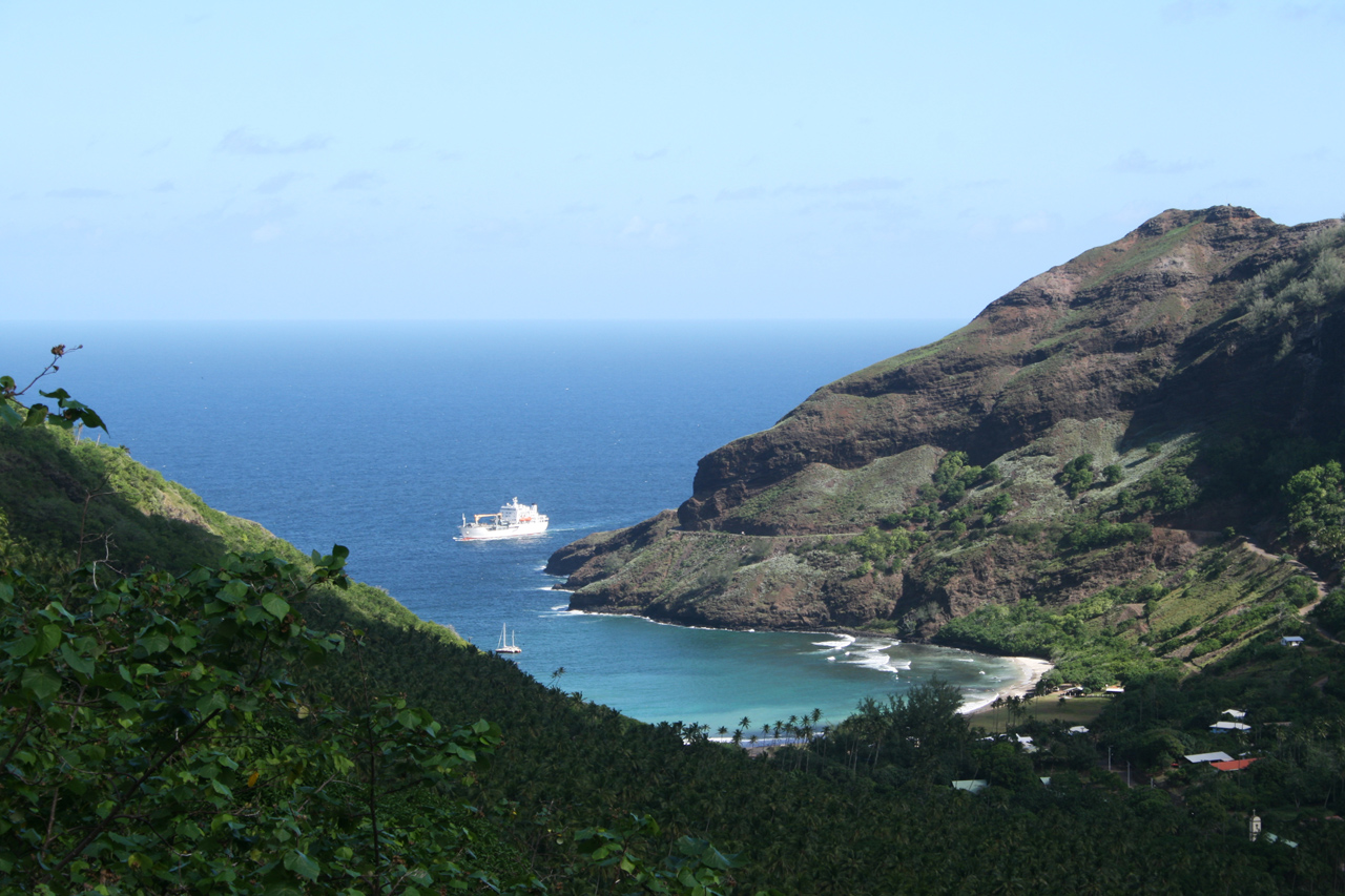 Aranui 3 entrant dans la baie de Hane (Ua Huka)